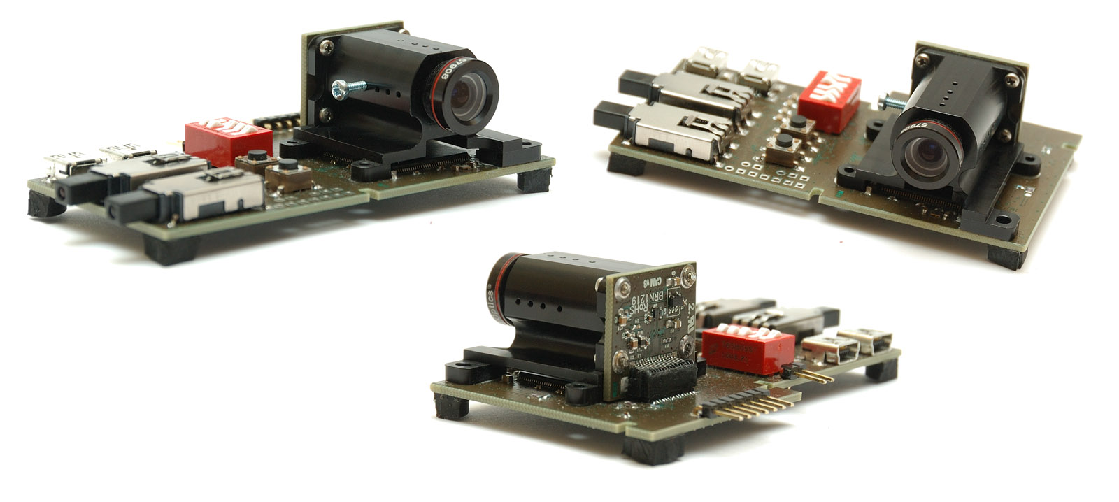 Eesti Tudengisatelliidi ESTCube-1 pardakaamera viimane, lennukõlbulik, prototüüp koos testimisliidestega.